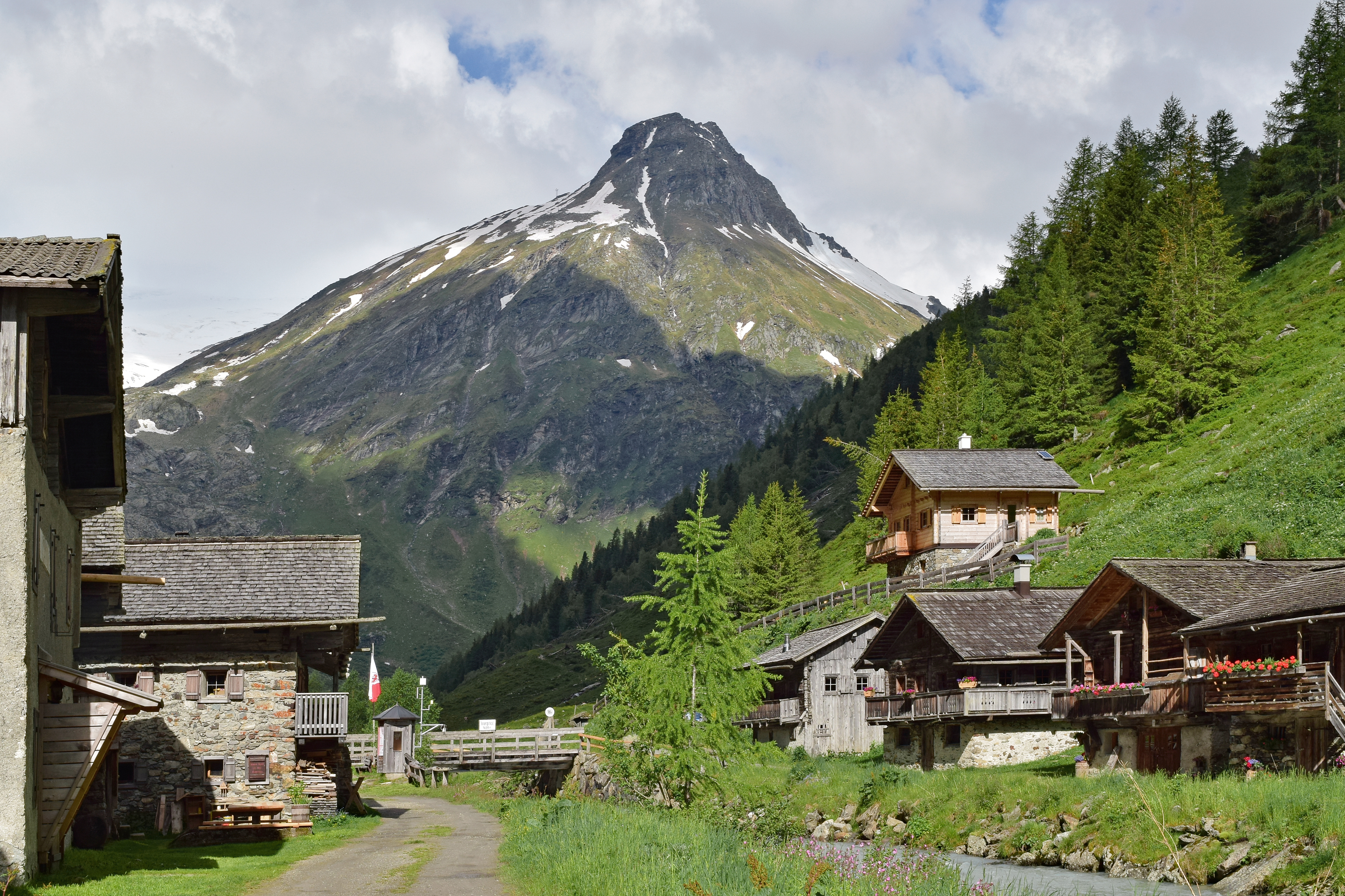 Blick von Innergschlöß zum 2718 m hohen Vorderen Kesselkopf This file shows the National Park Hohe Tauern in Austria.